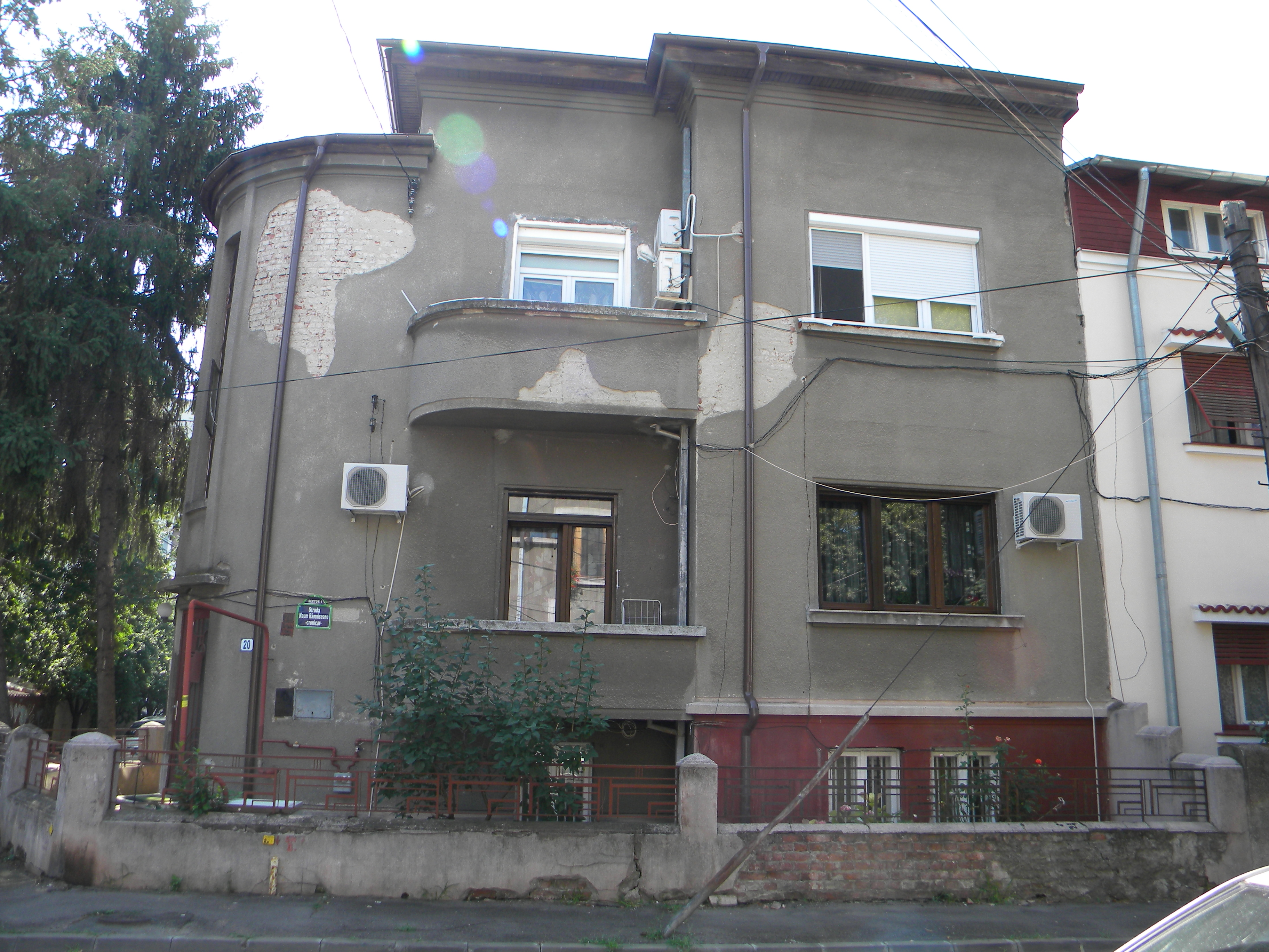 Bucuresti, Romania, Imobilul nr. 20 de pe Str. Naum Ramniceanu; B-II-m-B-19538